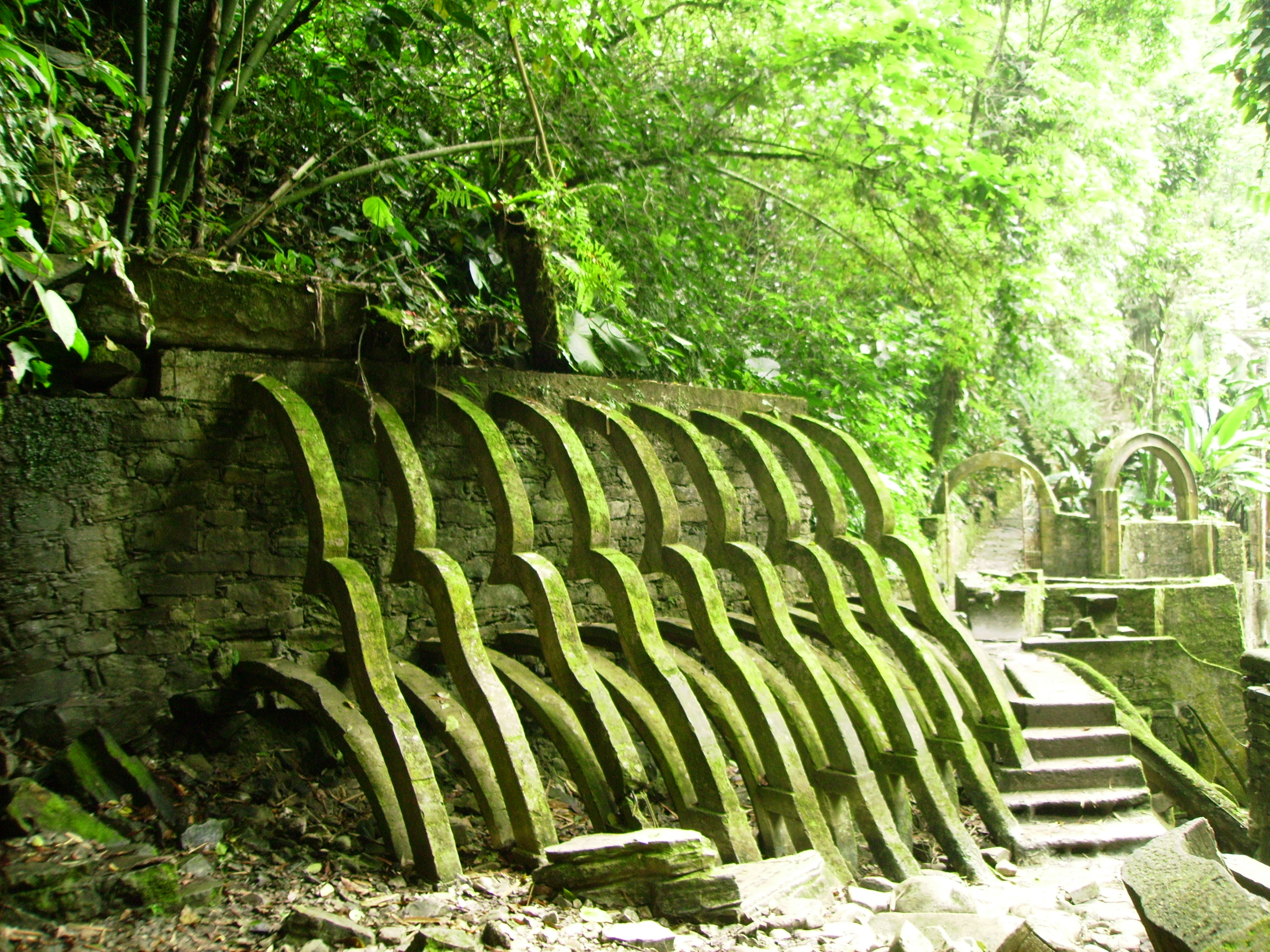 Sir Edward James' surrealist garden, Las Pozas, Xilitla, Mexico